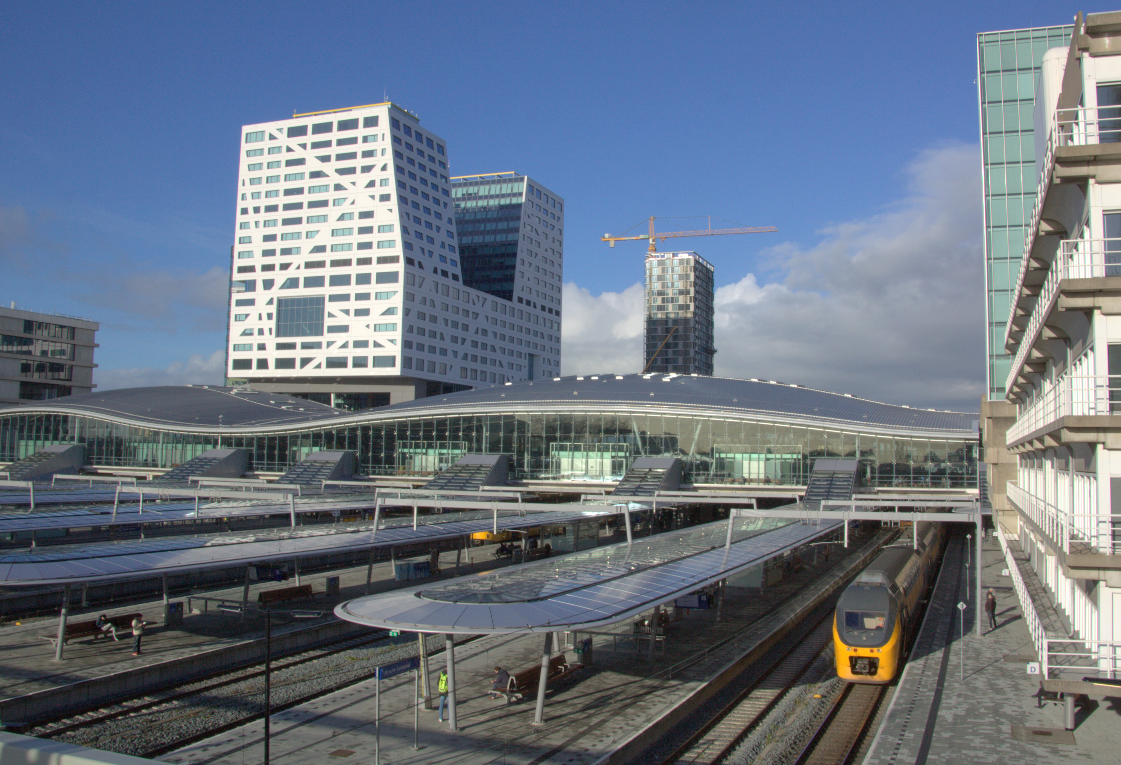 Van af de Moreelsebrug hebben we een mooi overzicht op Utrecht Centraal en het Stadskantoor.